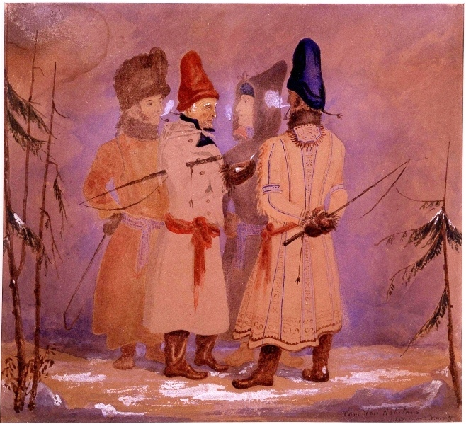 Canadian Habitants